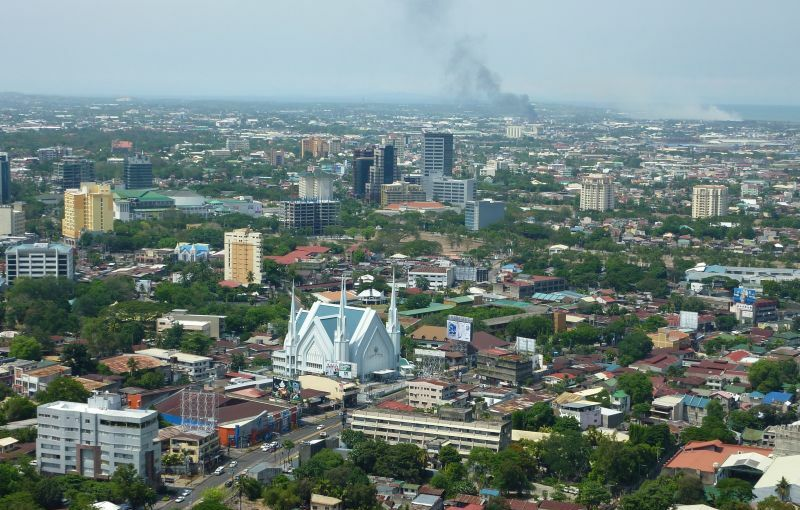 Cebu